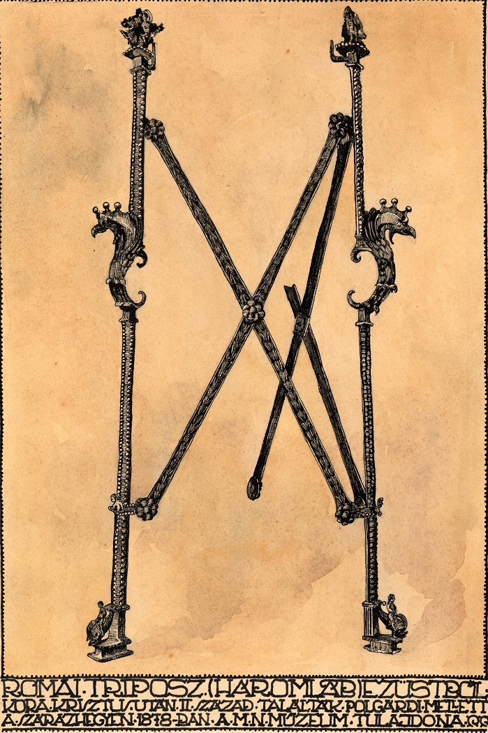 A polgárdi tripus. A rajz az állvány első restaurálás utáni állapotát ábrázolja